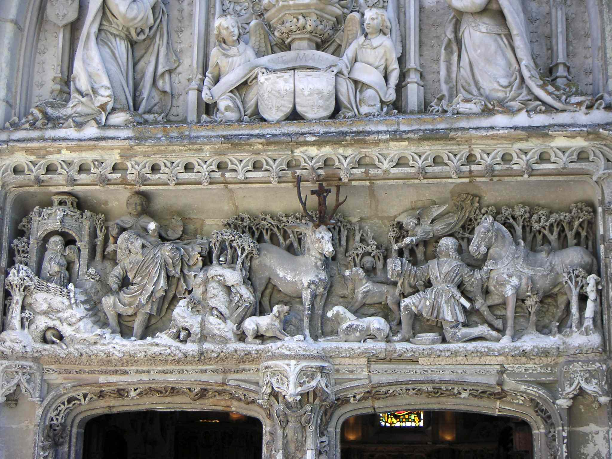 Détails du linteau de la façade de la chapelle Saint-Hubert du château d'Amboise (France), septembre 2005 Auteur:LonganimE